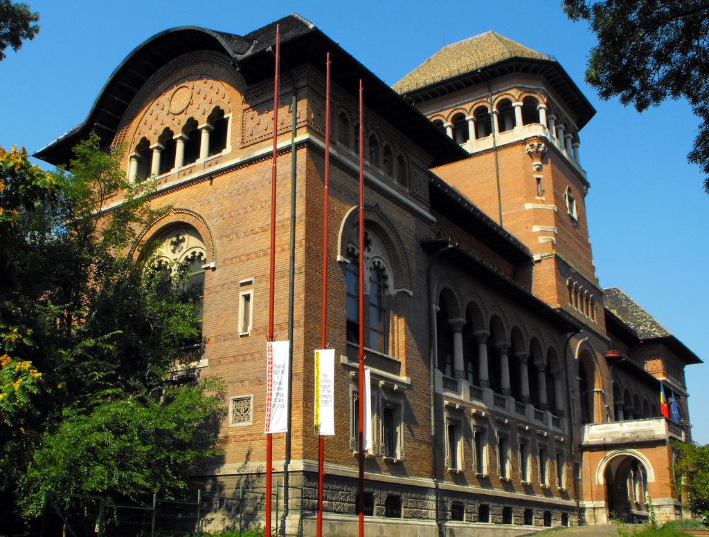 ex muzeul de istorie a pcr,ex Monetaria Statului